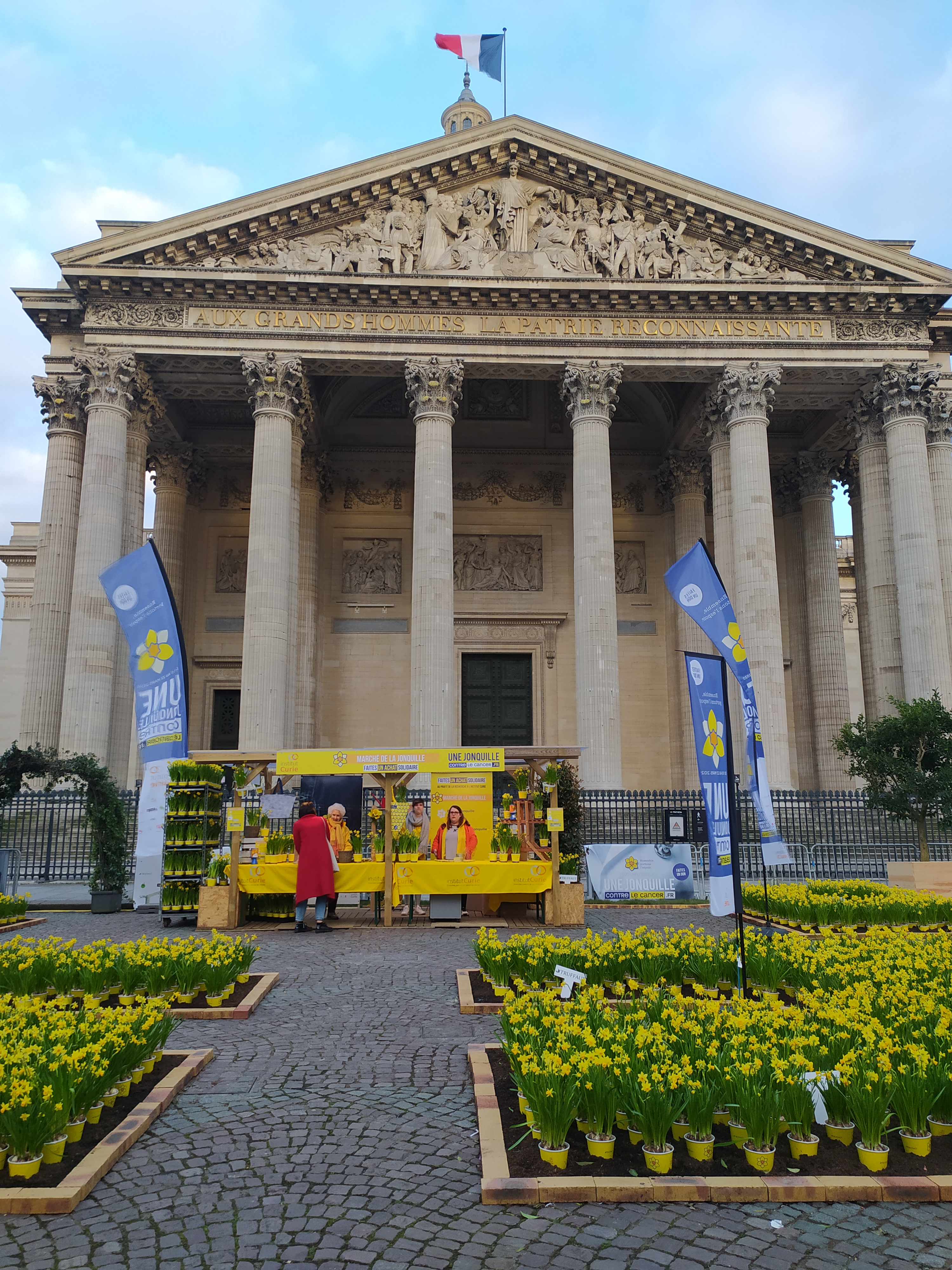 Un narcis contra el cancer es una campanya de l'Institut Curie. A la foto, el punt de venda a la plaça del Panteon de Paris